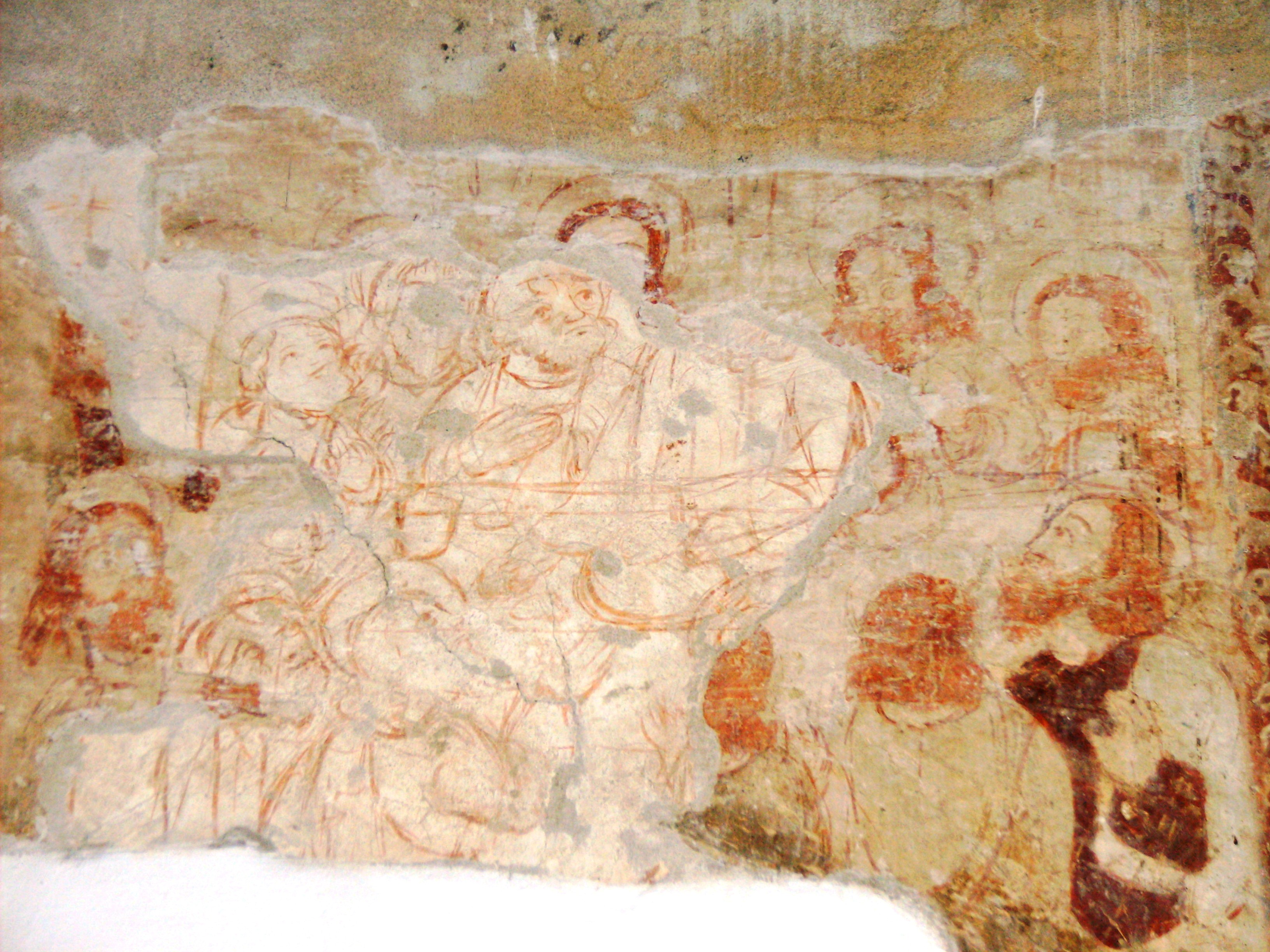 Igreja Matriz de São Sebastião, Vila de São Sebastião, Angra do Heroísmo, Açores: afresco tardo-medieval (detalhe).